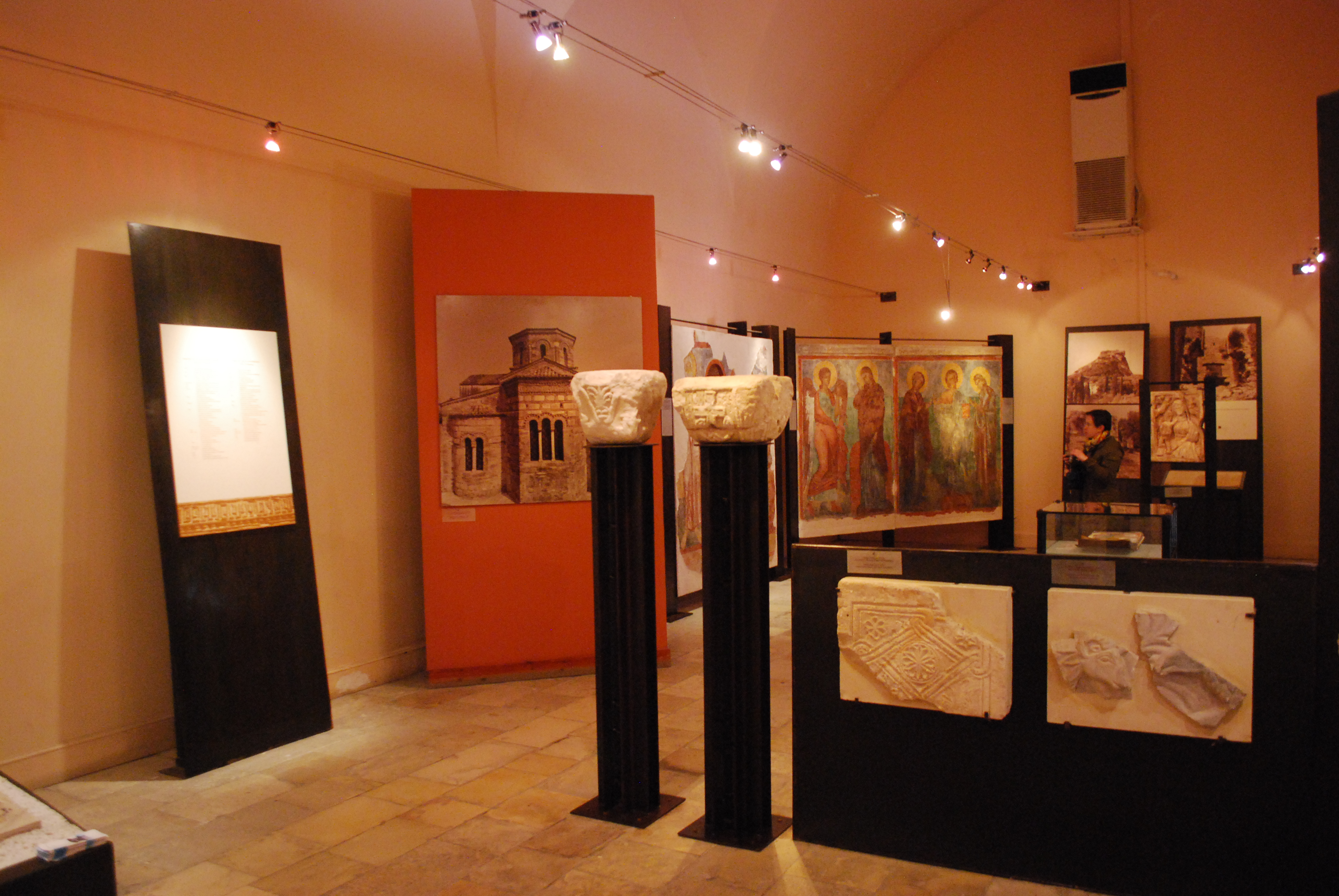 Vue du Vieux Fort de Corfou.